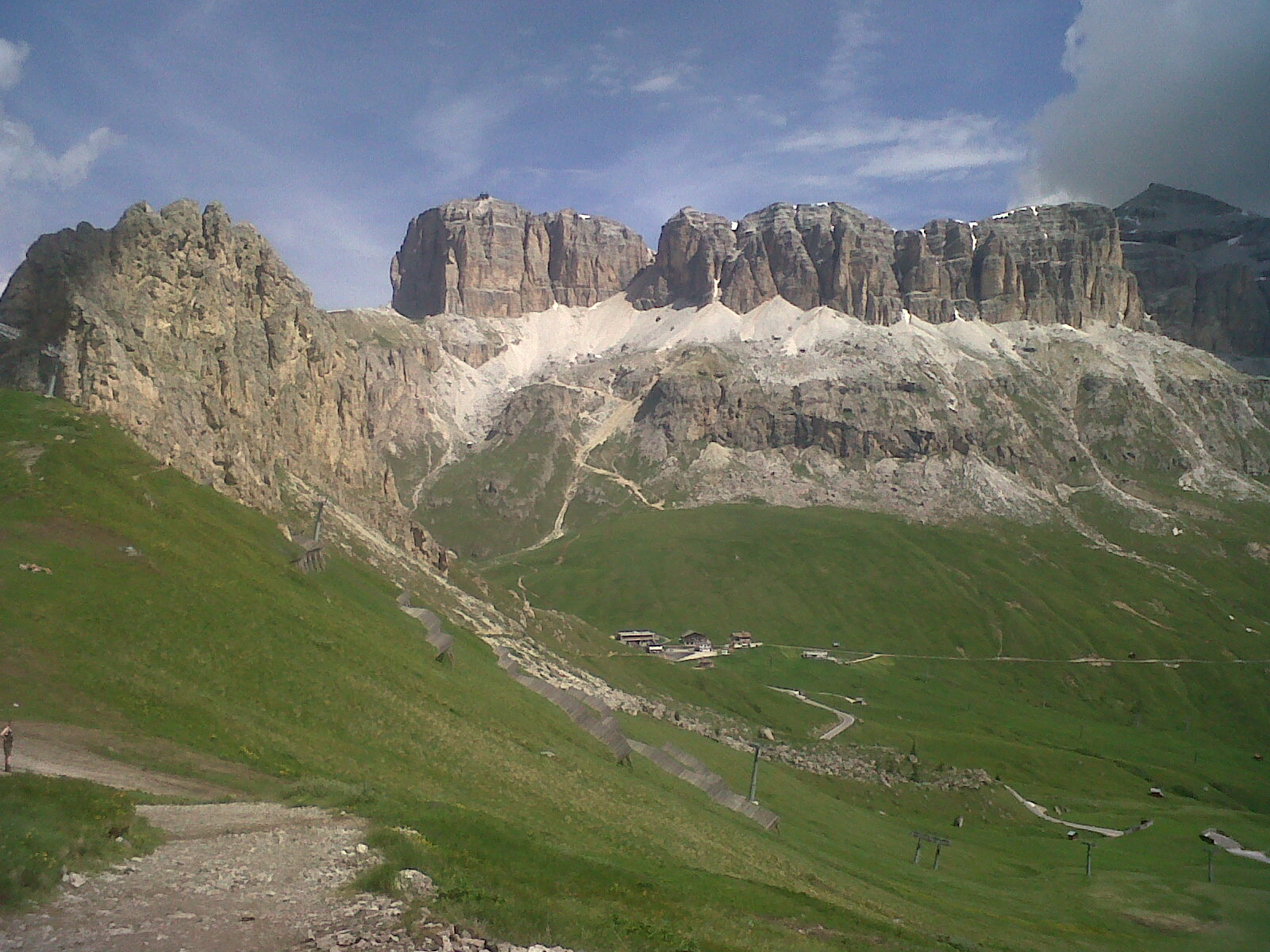 Il Gruppo Sella visto dal Viel dal Pan. Sulla sinistra il Sas Becè.